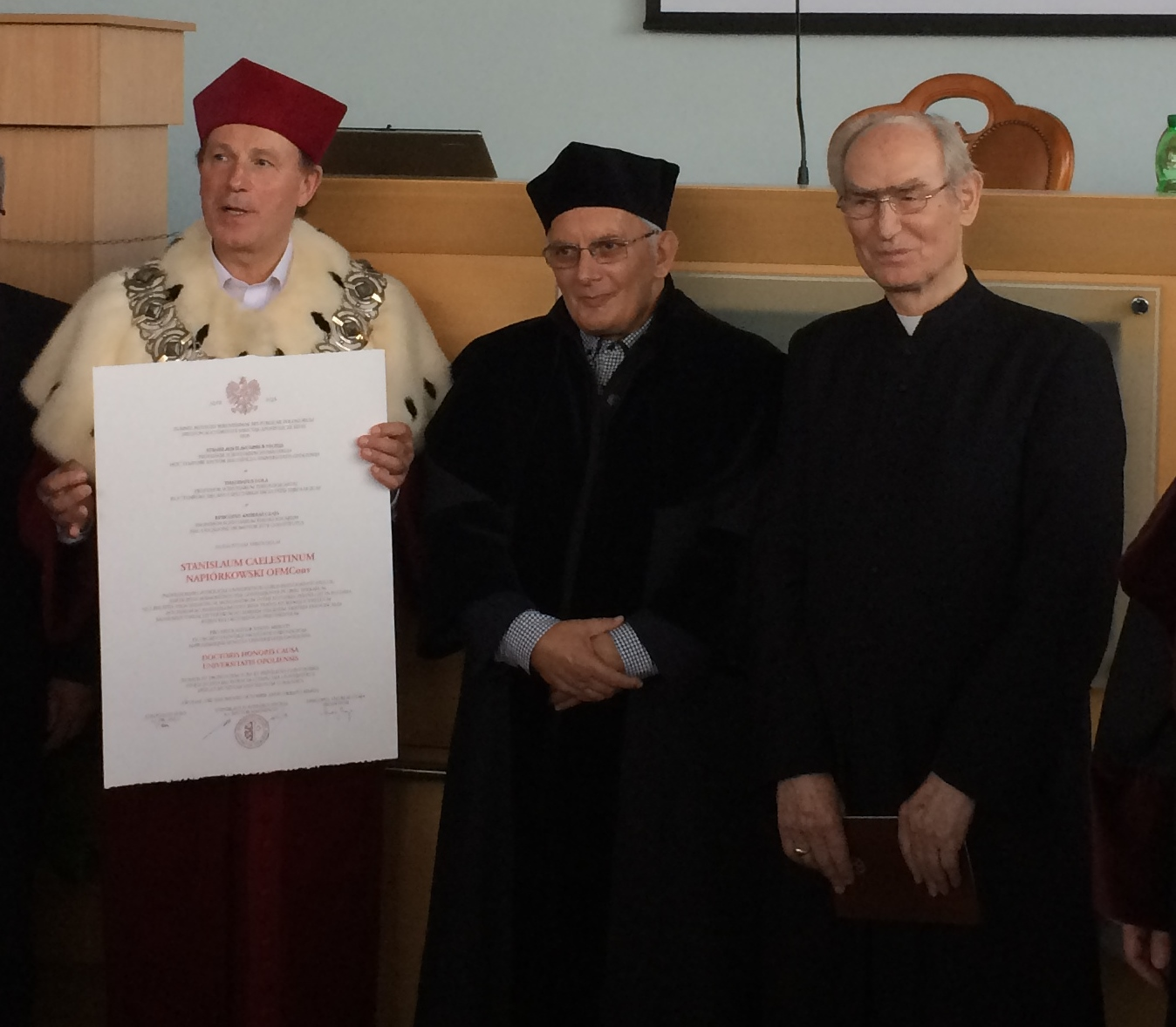 Rektor UO prof. S. Nicieja, prof. Karol H. Karski i abp prof. Alfons Nossol 30-10-2014